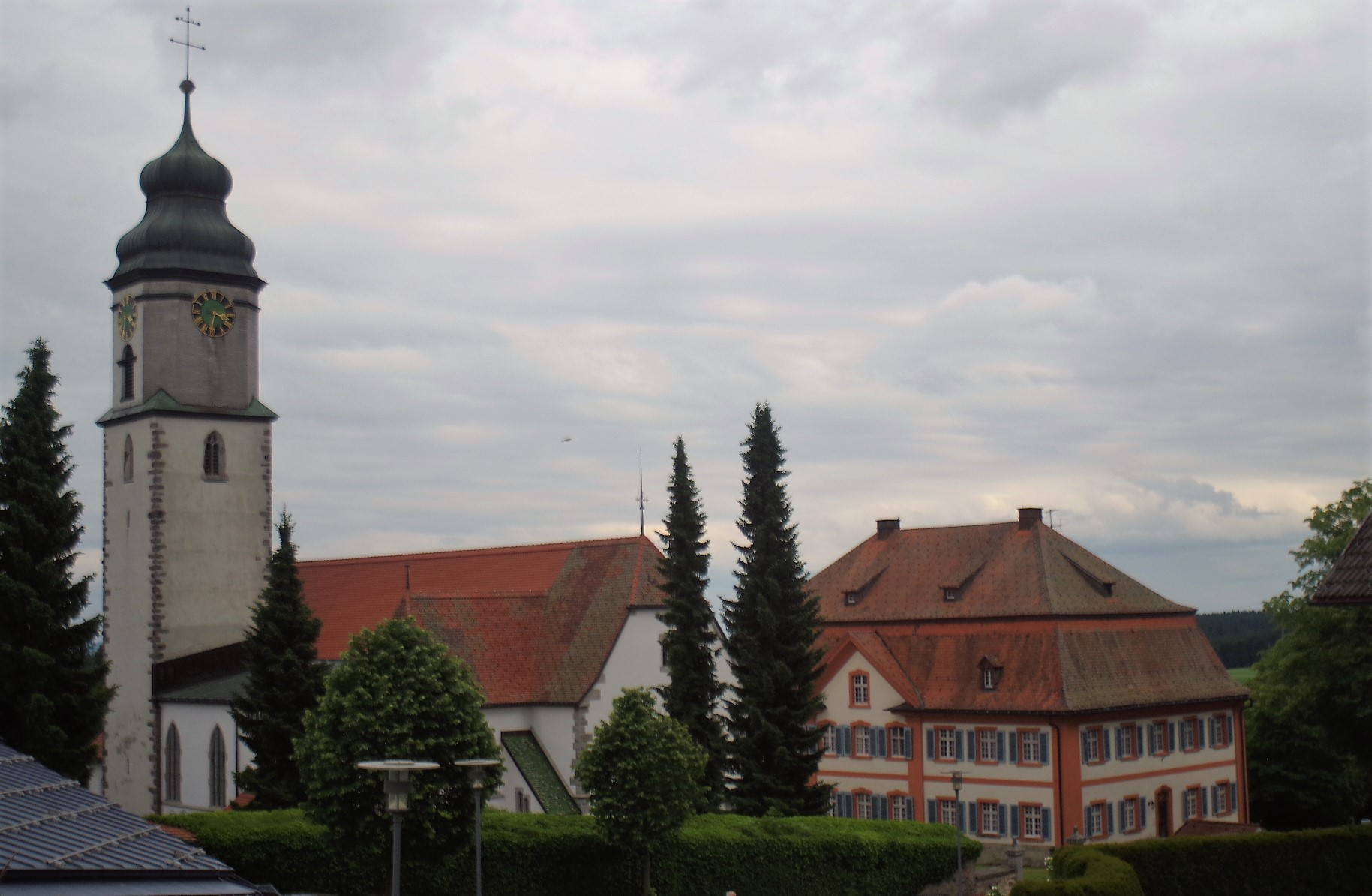 Kirche und Propstei in Grafenhausen